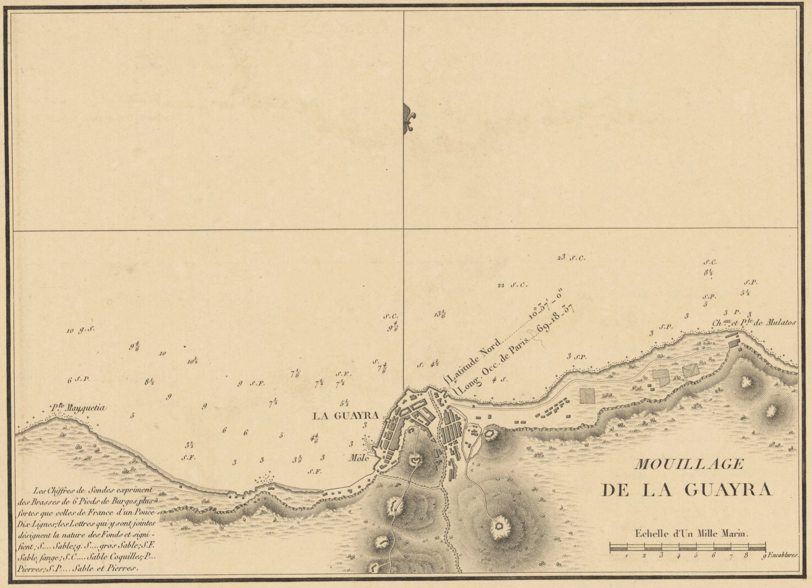 Carte du mouillage et des installations de La Guaira (La Guayra) en 1831 près de Caracas. Origine : Service hydrographique de la Marine française. Détail d'une série de quatre cartes consacrée aux environs de Puerto Cabello.